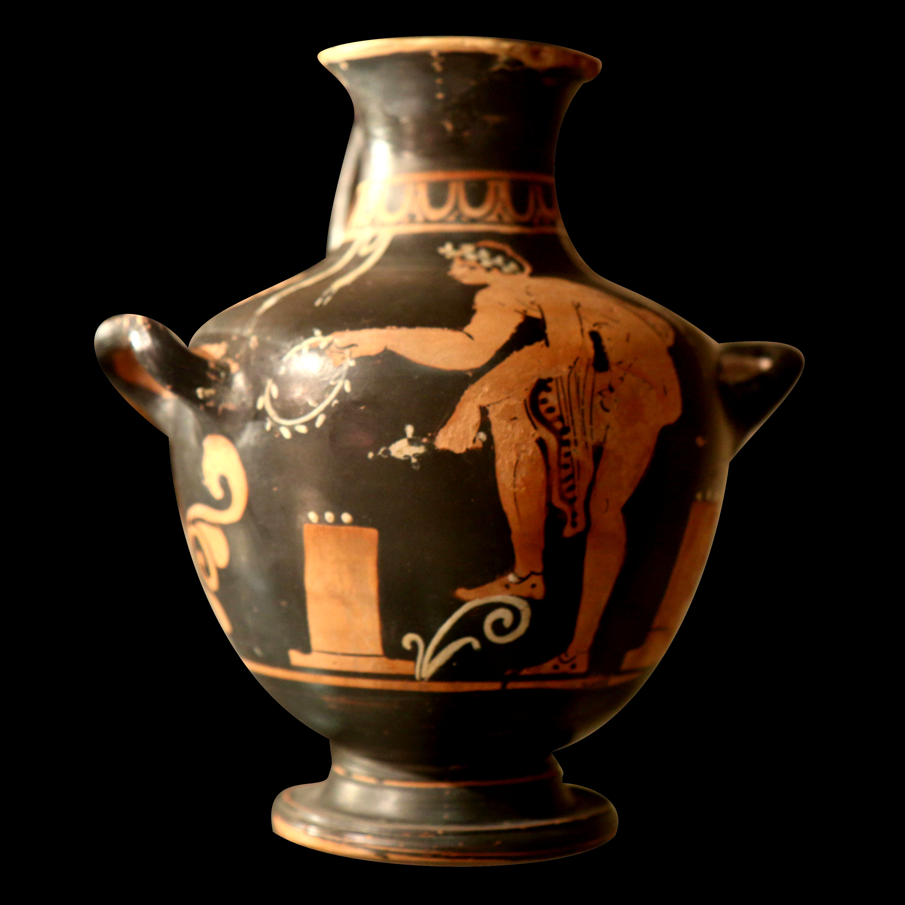 Un jeune homme nu couronné élève une couronne au dessus d'un autel